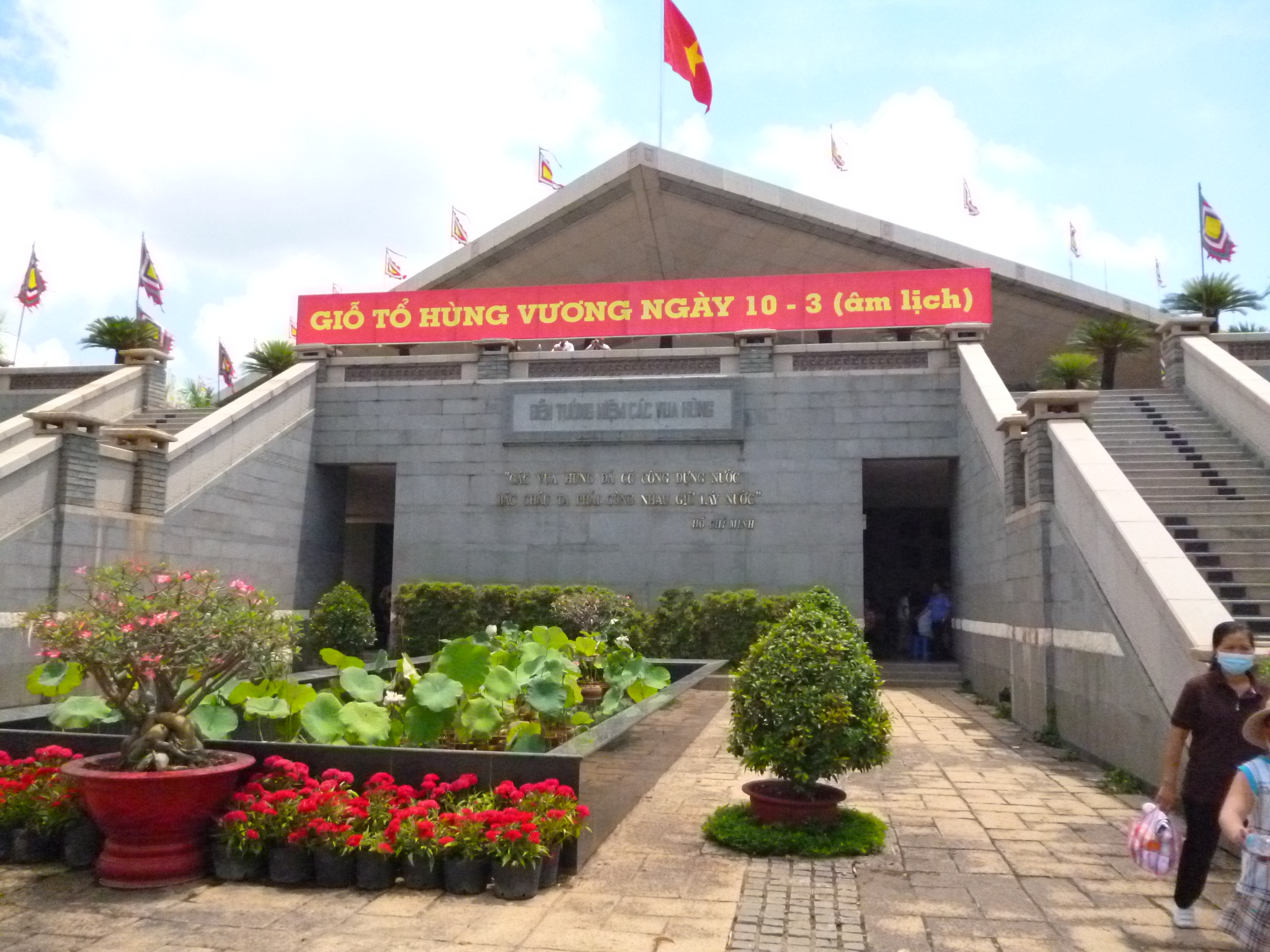 Hình chụp bằng máy ảnh cá nhân về công viên quận 9